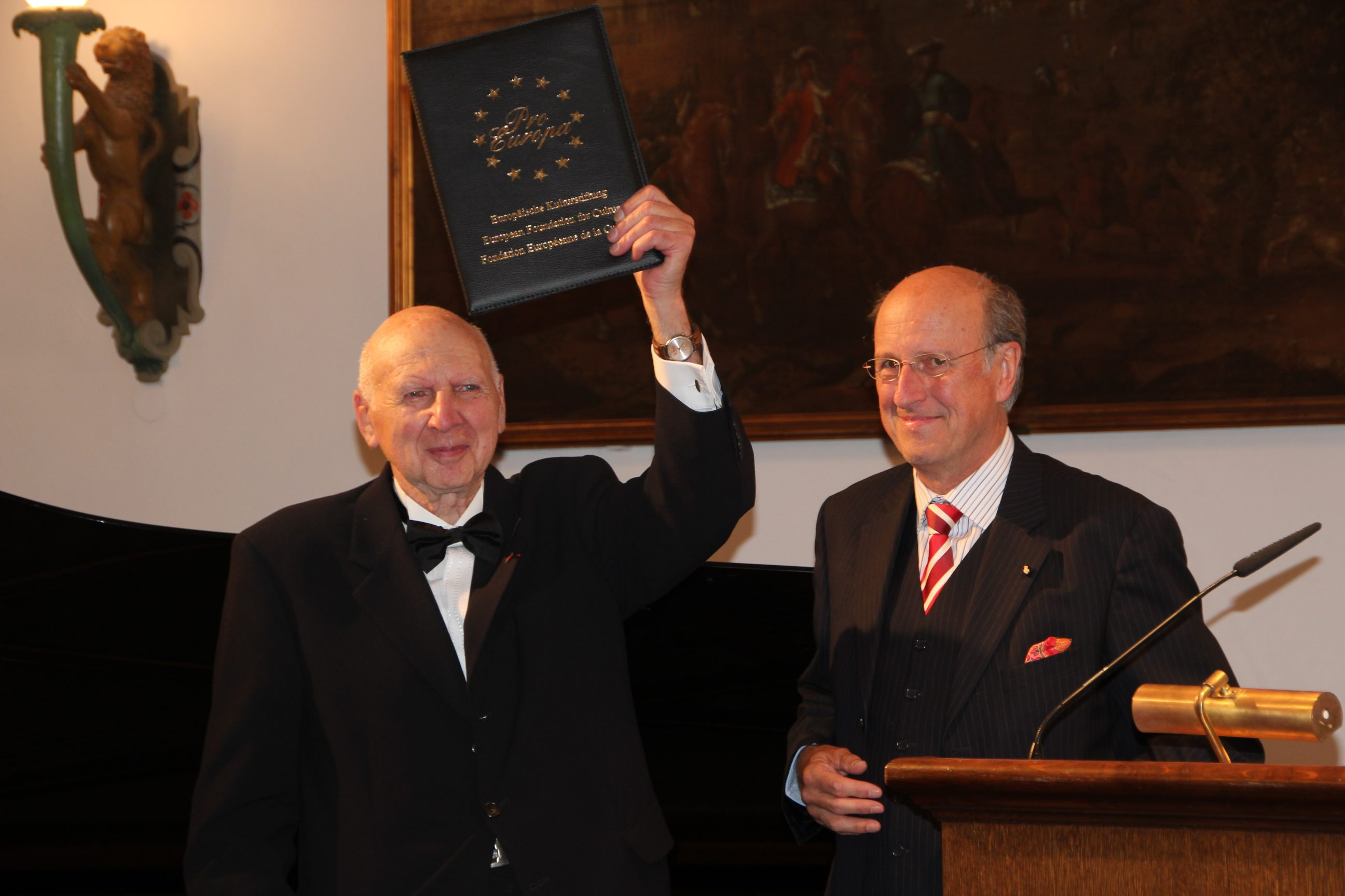 Freiburg im Breisgau Fribourg en Brisgau, Bade